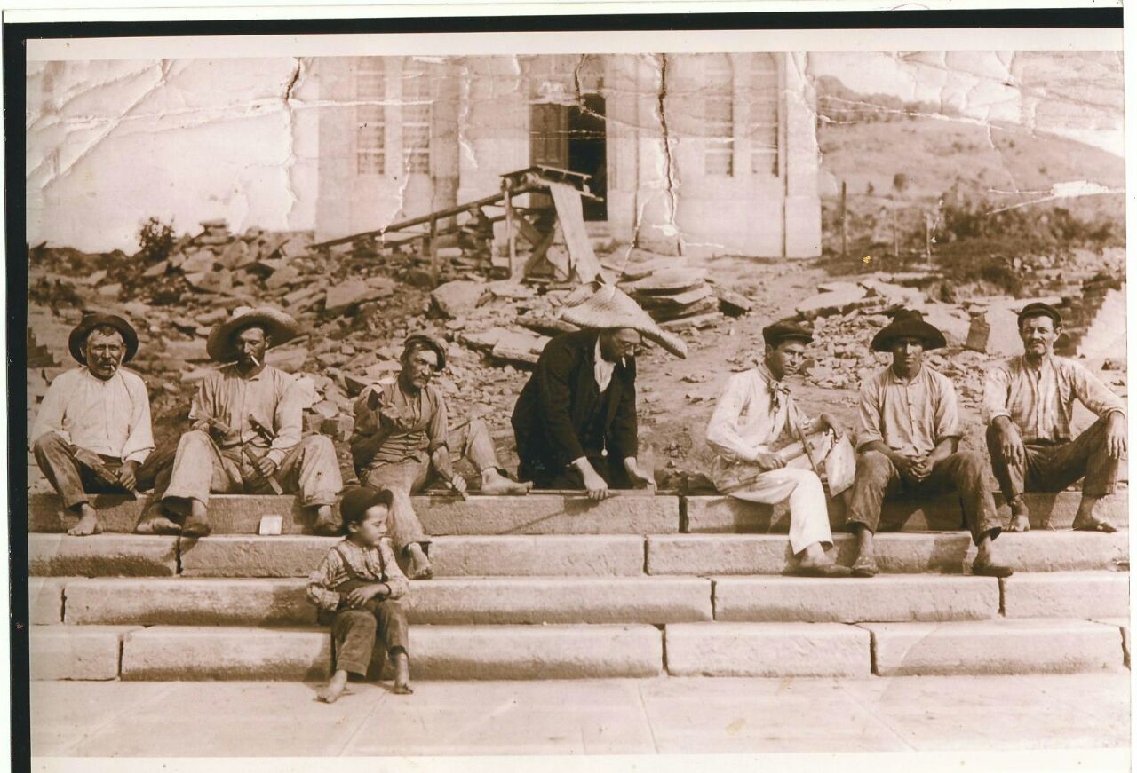 Português do Brasil: Esta foto foi obtida através da digitalização da foto do documento físico. A foto representa a construção da escadaria da Igreja de Barra do Ouro, hoje atual distrito de Maquiné. É também uma foto emblemática, pois representa a degradação do patrimônio arquitetônico do Município ao longo dos anos, se comparado com as fotos atuais da igreja e seu entorno.